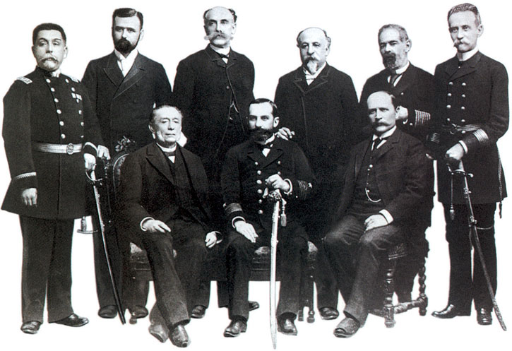 Junta de Gobierno de Iquique de 1891. Ministerio y colaboradores. de izquierda a derecha de pie General Estanislao del Canto, a cargo del ejército Constitucional; Joaquin Walker Martínez, Ministro de Relaciones Exteriores; Manuel José Irarrázaval, Ministro del Interior; Isidoro Errázuriz, Ministro de Justicia e Instrucción Pública; Gregorio Urrutia, Asesor del Ejército; General Adolfo Holley, Ministro de Guerra. Sentados de izquierda a derecha, los miembros de la junta de gobierno: Waldo Silva Palma, Vicepresidente del Senado; Capitán de Navío Jorge Montt, Presidente de la Junta; Ramón Barros Luco, Presidente de la Camara de Diputados.